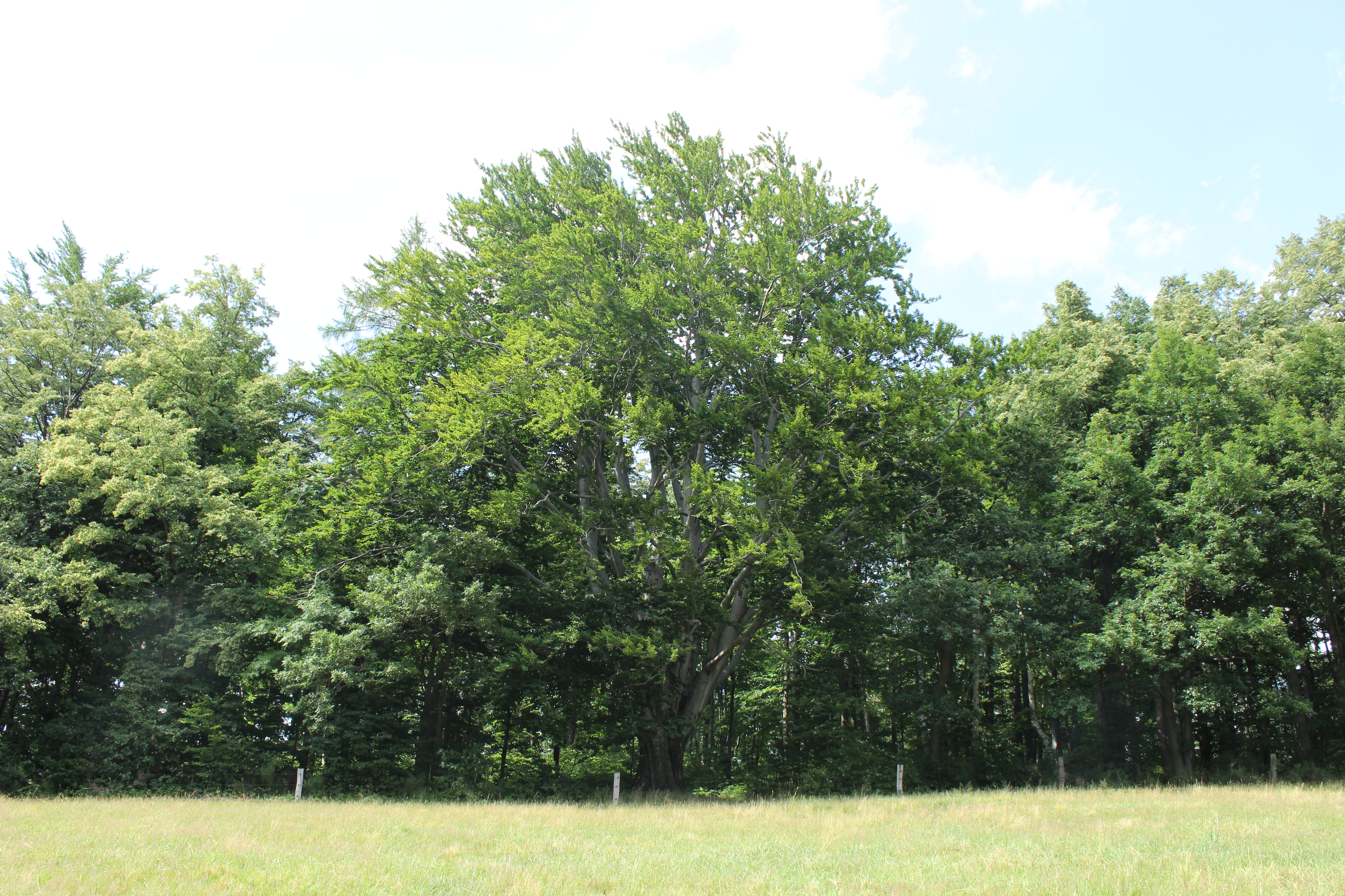 Jedinec buku lesního pojmenovaný Buk u Obřího sudu rostoucí severně od Lázní Libverdy.